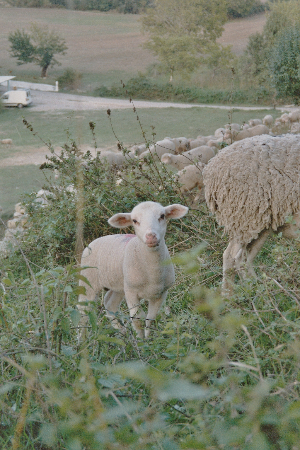 Moutons à Beaumont-de-Pertuis dans le jardin hors-les-murs entre la tour M et N.